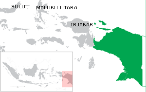 created by Borgx for Indonesian wikipedia Licensing Kategori:Peta penunjuk posisi di Indonesia